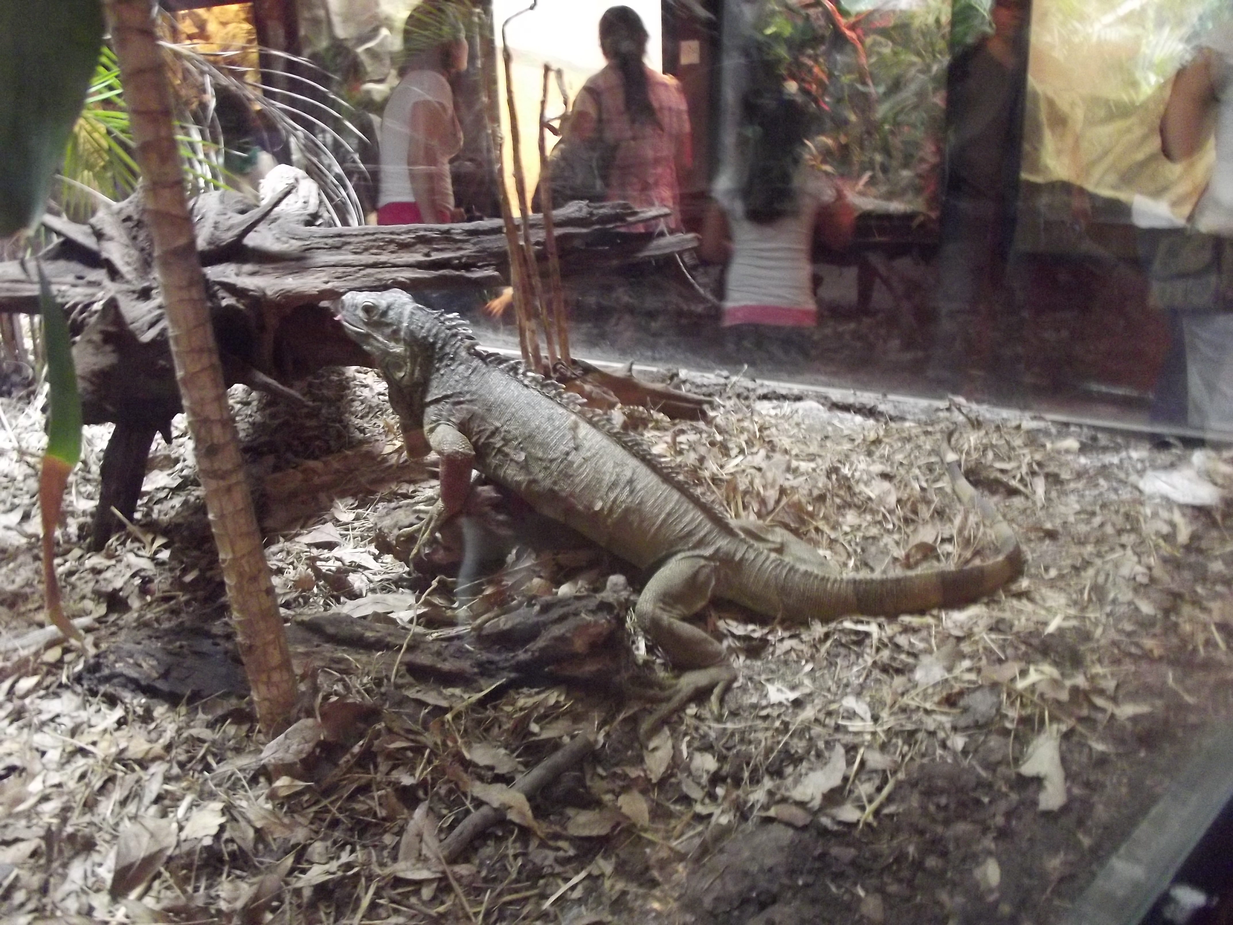 Iguana, Museo del Desierto, Saltillo Coahuila